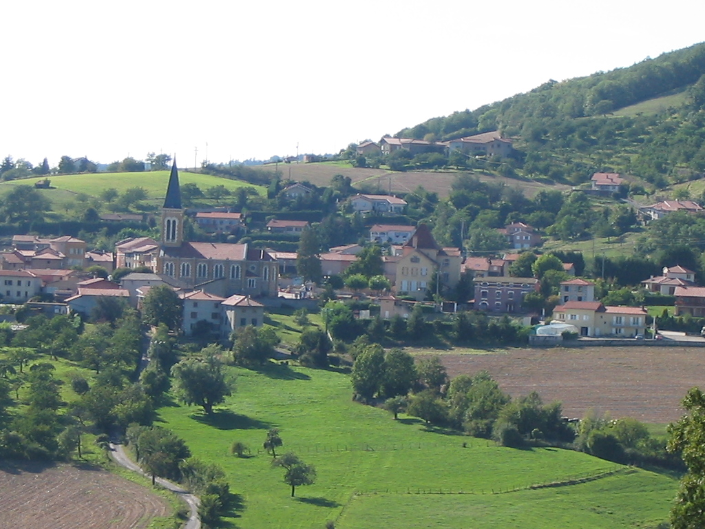 Le village de Brullioles (Rhône)